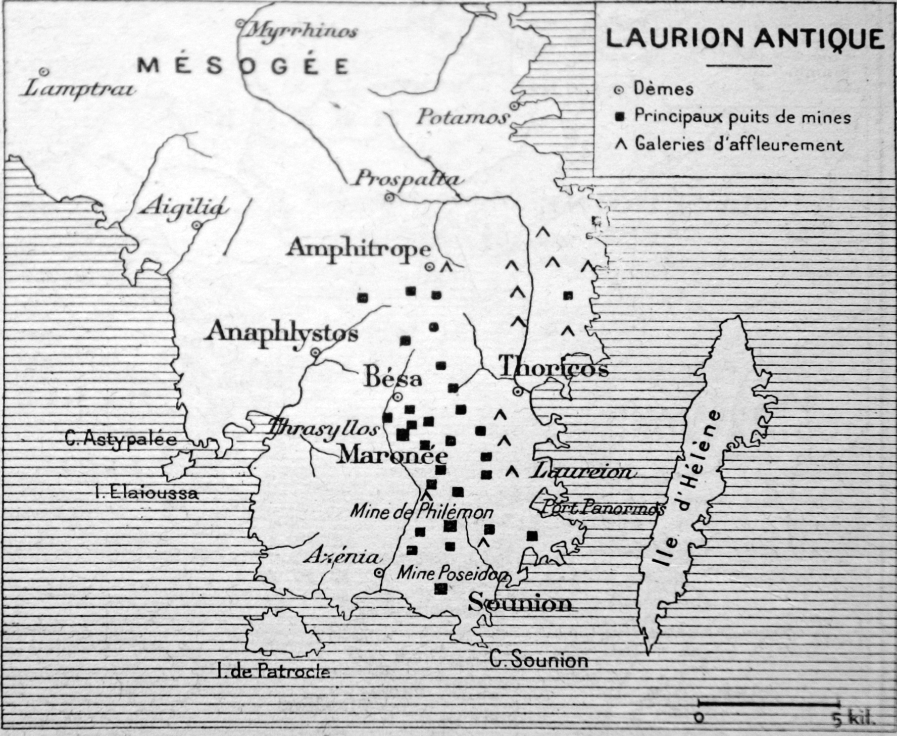 photographie d'une illustration de l'ouvrage libre de droit Charles Daremberg, Edmond Saglio Dictionnaire des antiquités grecques et romaines, tome 3, volume 2, Hachette, 1877-1914, p. 1850